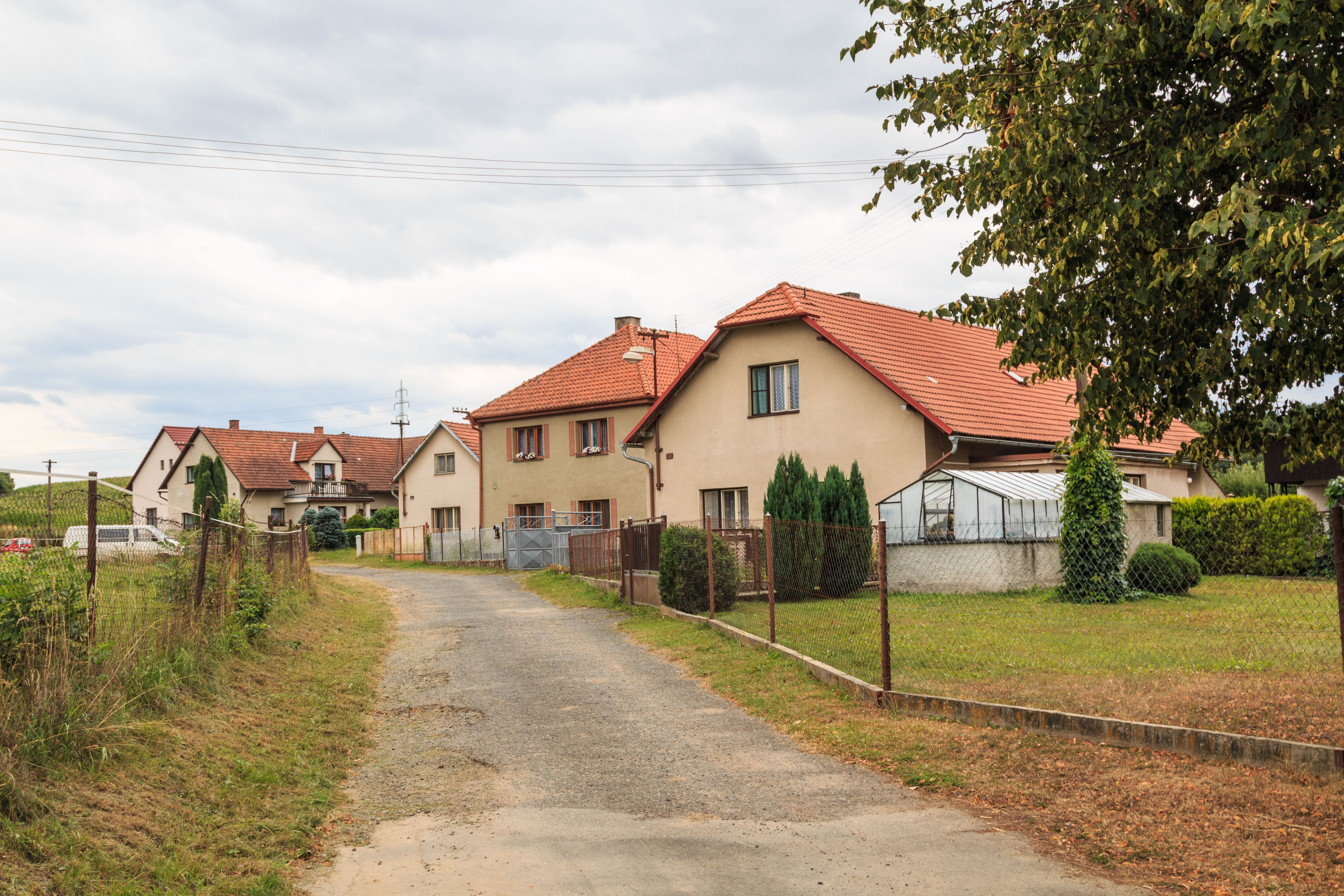 Kamenné mosty čp. 53